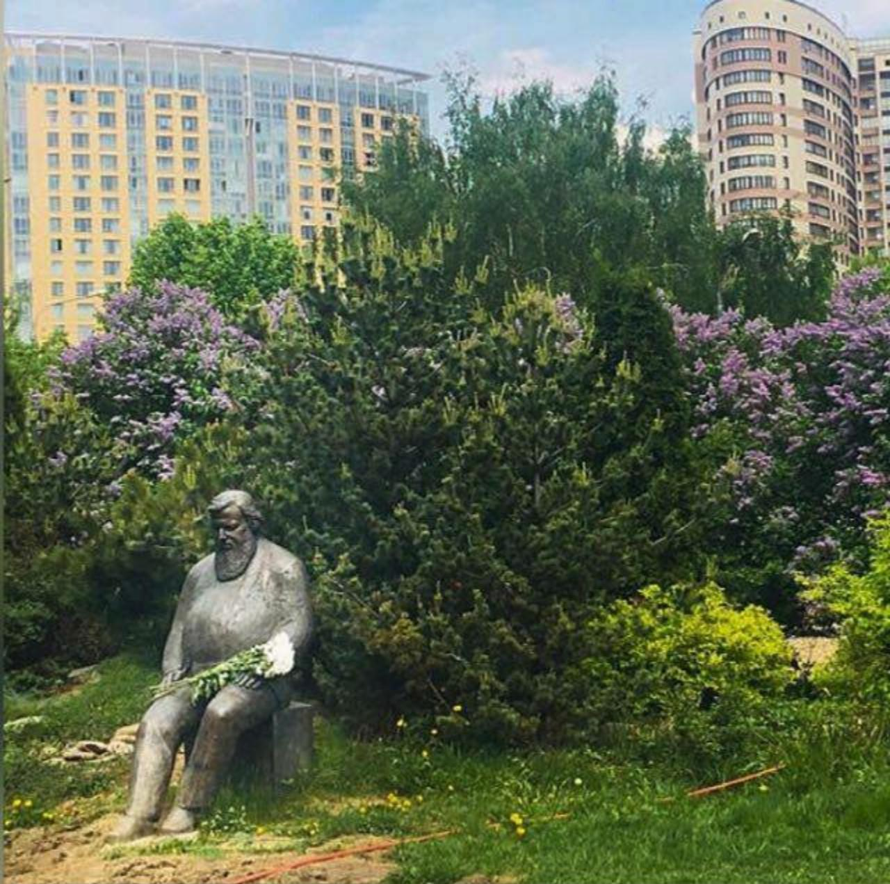 Сад ГБОУ школа-интернат "Интеллектуал". Памятник основателю школы Е. В. Маркелову.